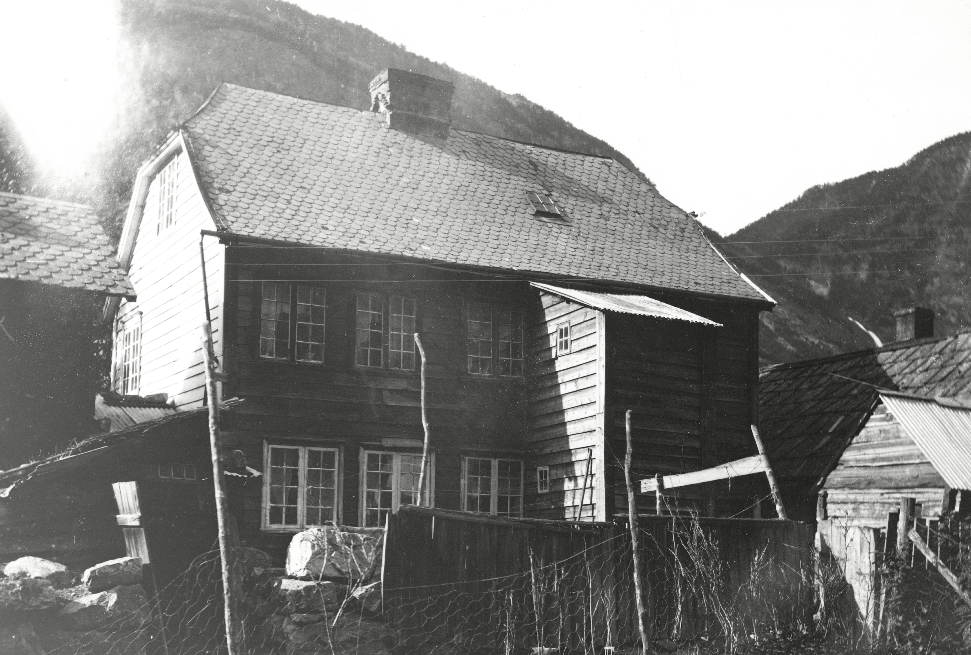 Synneva Eris hus, Husfred i Hauge, Sogn og Fjordane